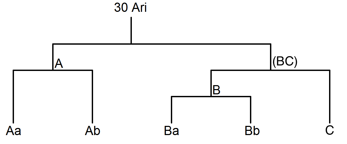 Structure hiérarchique du système stellaire-planétaire 30 Arietis : - le sous-système A, composé des étoiles Aa et Ab - le sous-système B, composé de l'étoile Ba et de sa planète Bb, ainsi que de l'étoile "?" (nom indéterminé pour le moment).